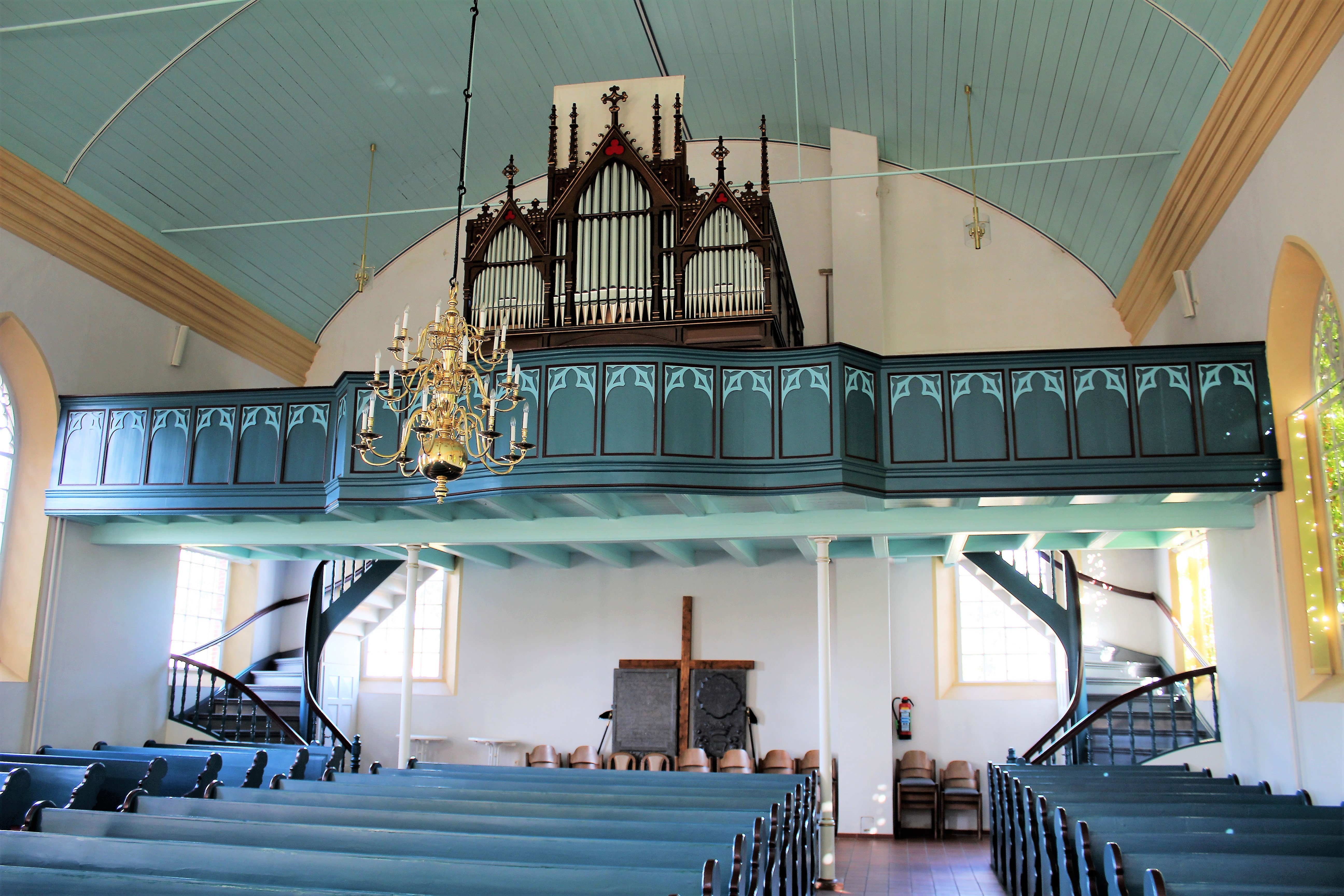 Evangelisch-reformierte Kirche Wymeer, Landkreis Leer, Niedersachsen, Deutschland